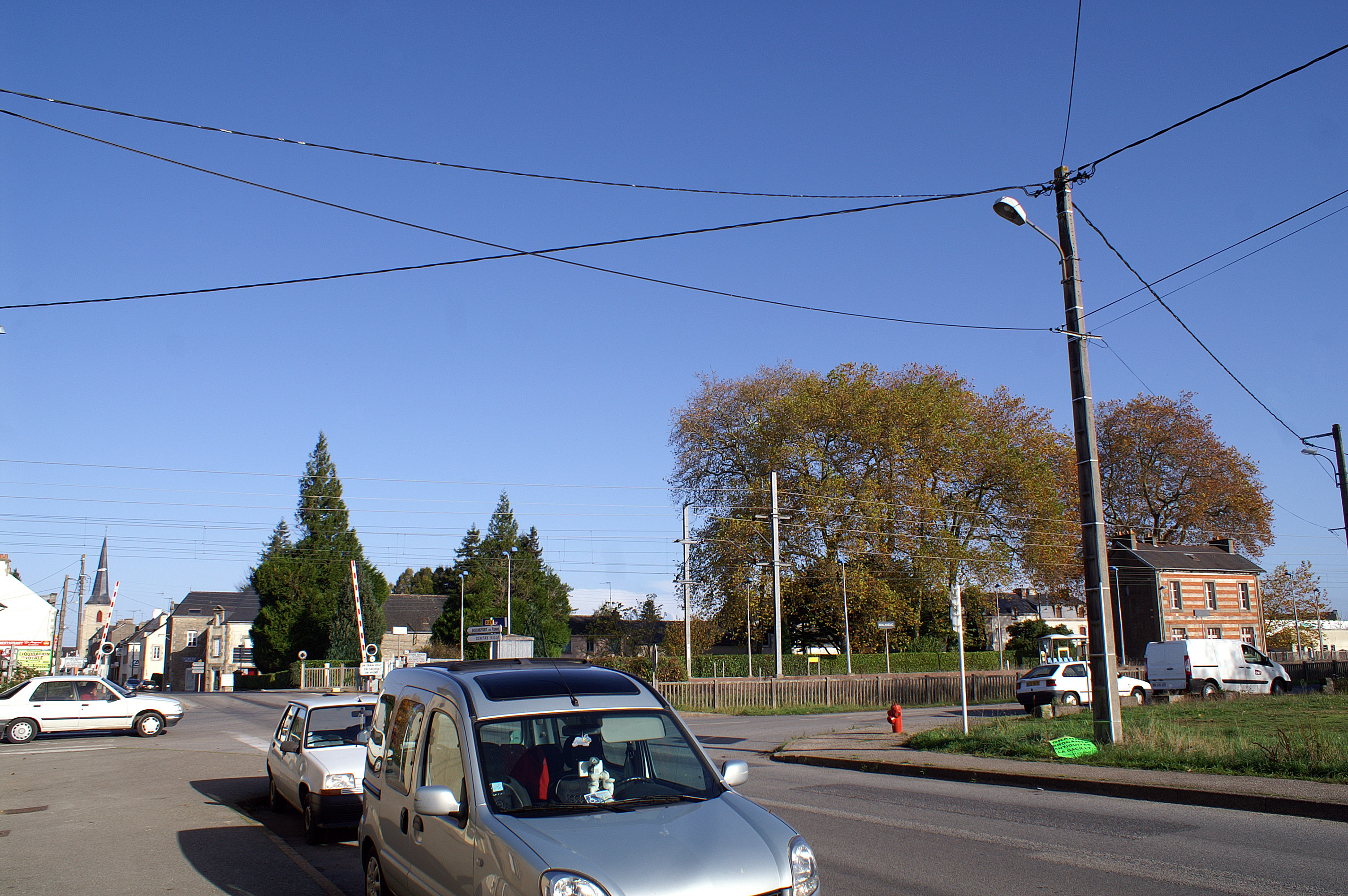 Malansac, entrée du bourg par le passage à niveau et la gare.